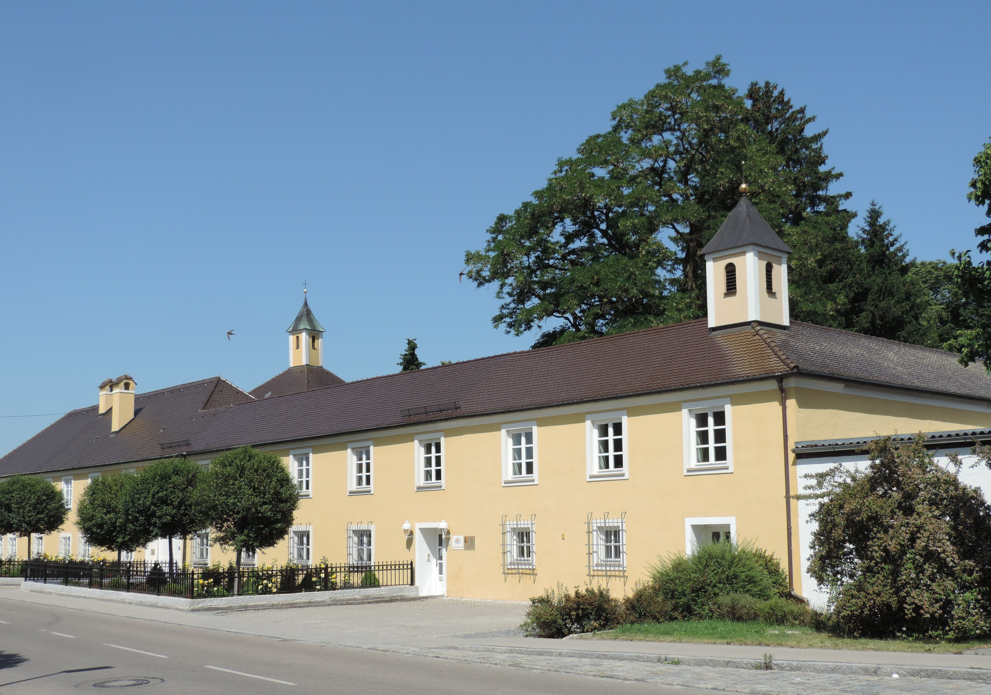 Schloss Nordendorf